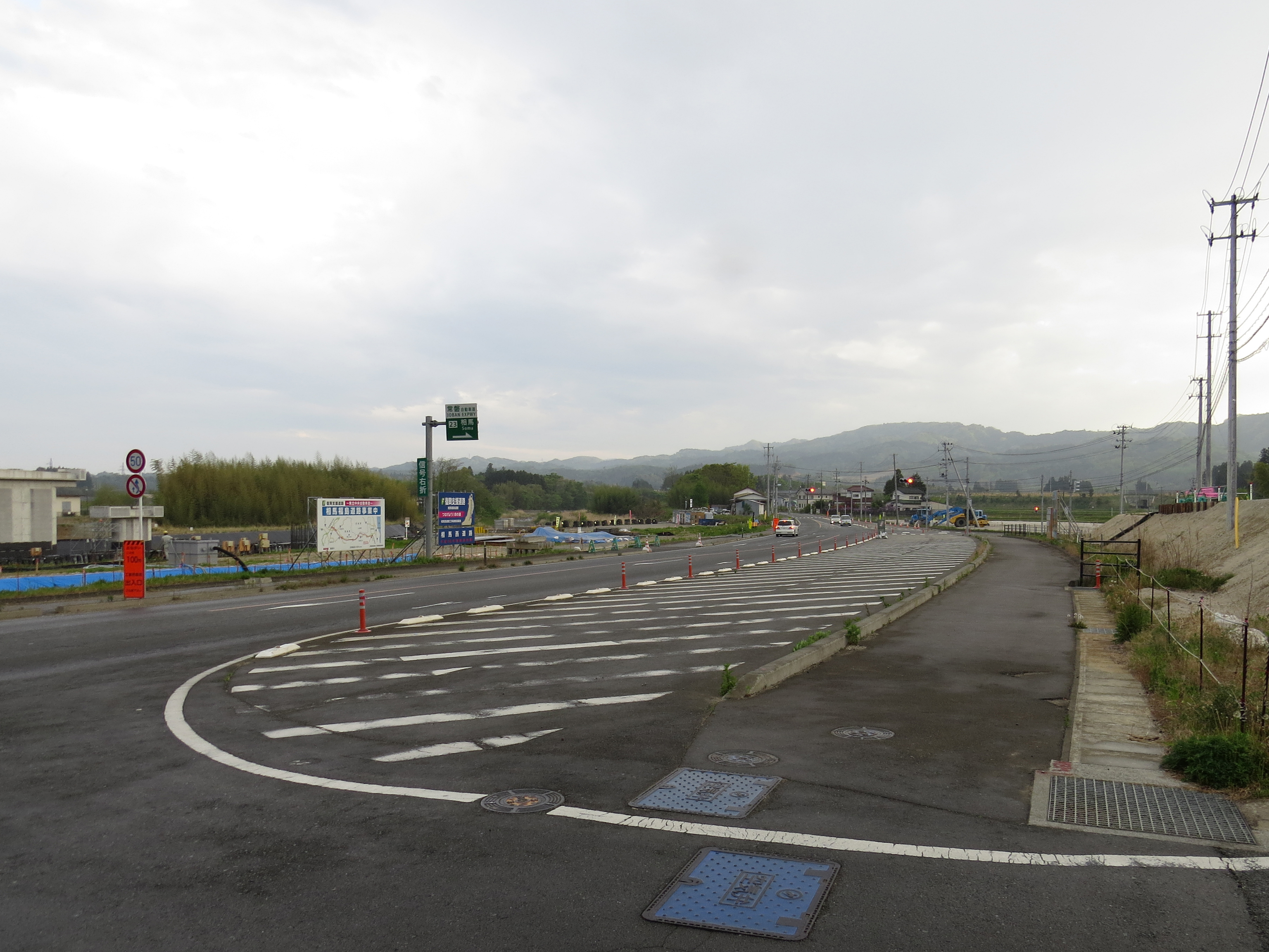 常磐自動車道・東北中央自動車道 相馬IC